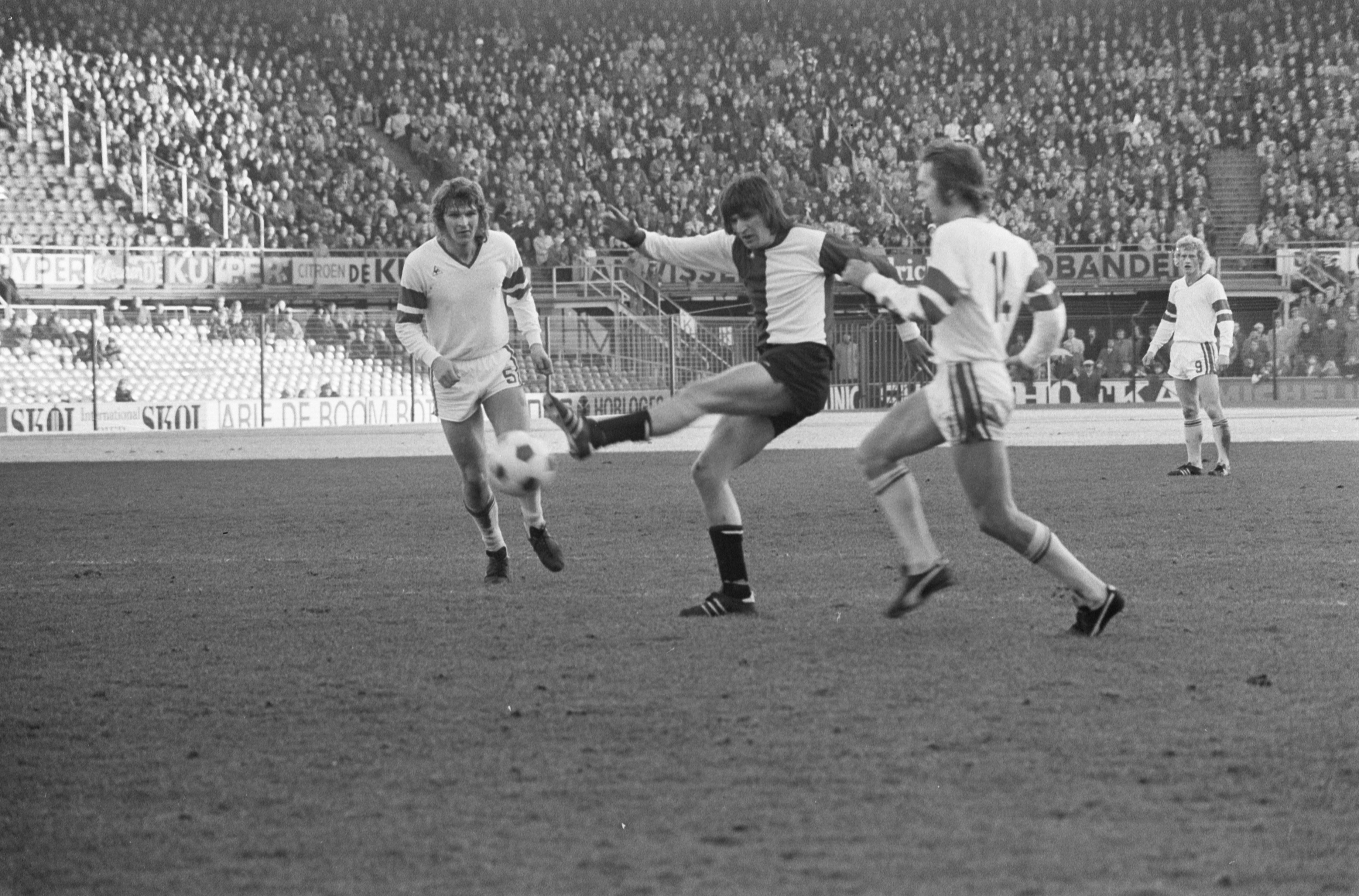 Match de football Feyenoord - AZ'67 (4-0) : Lex Schoenmaker (au centre) en action. Photographie par Bert Verhoeff / Anefo.